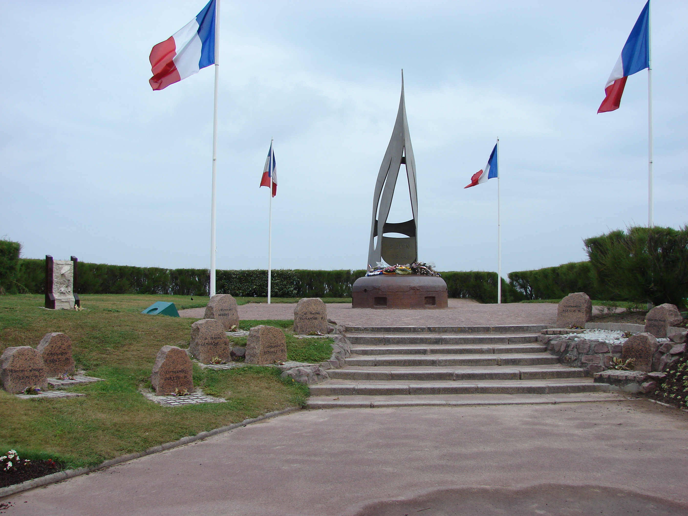 Monument Français Libres - Monument Kieffer, Ouistreham, Lower Normandy, France